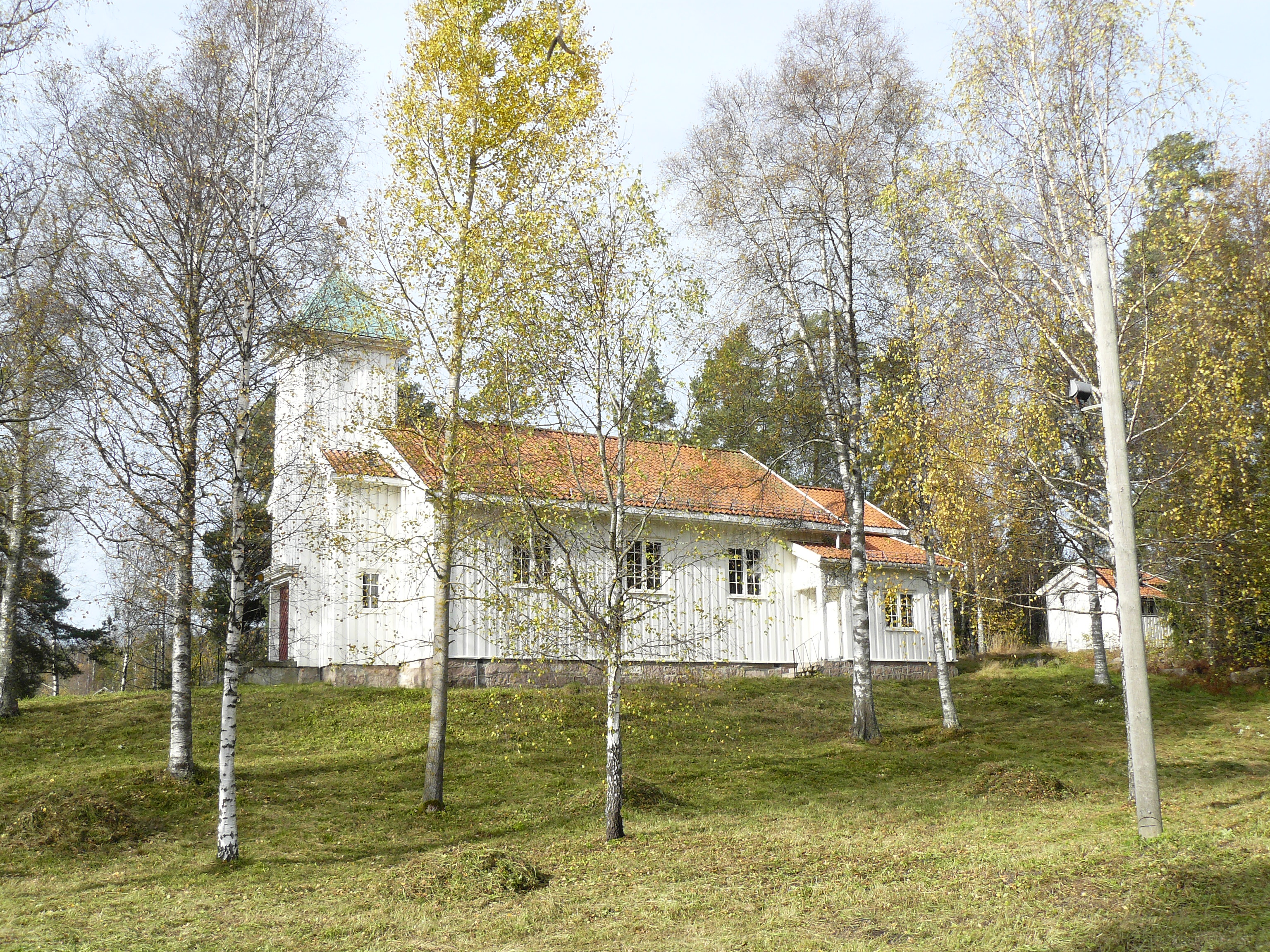 Maridalen Chapel, Oslo